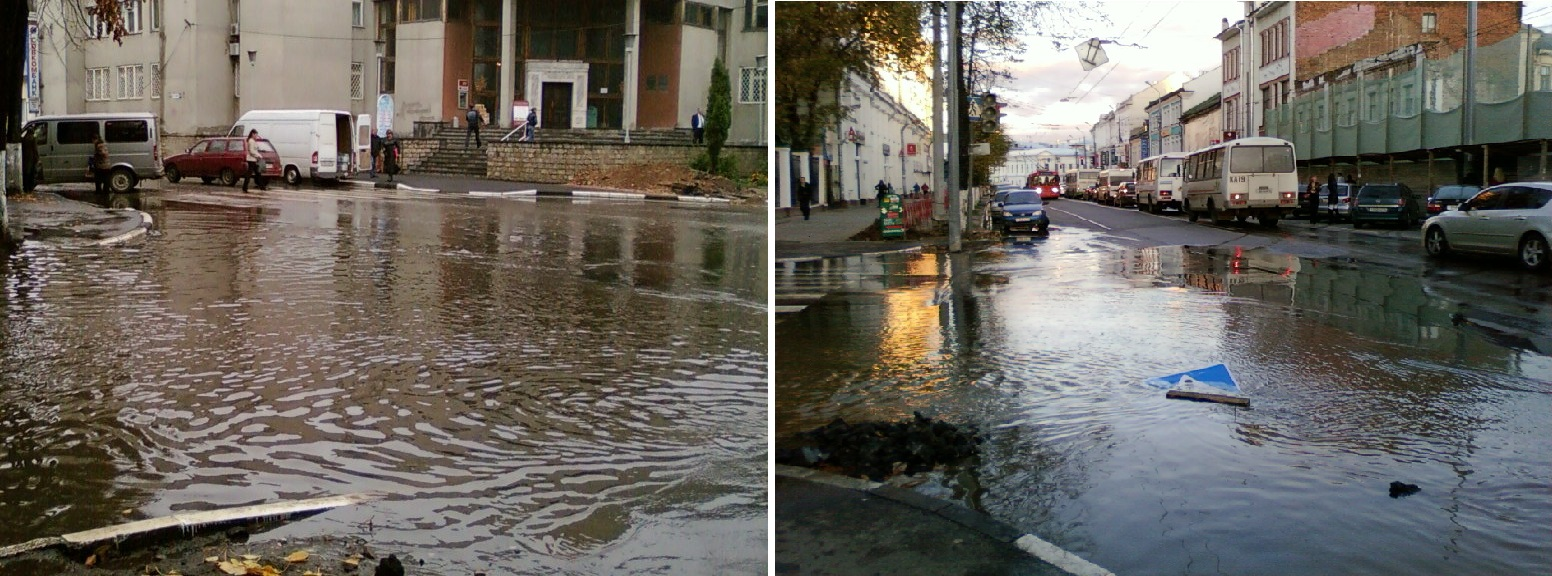 Ul. Sobinova in Yaroslavl, Russia flooded in November 2010.